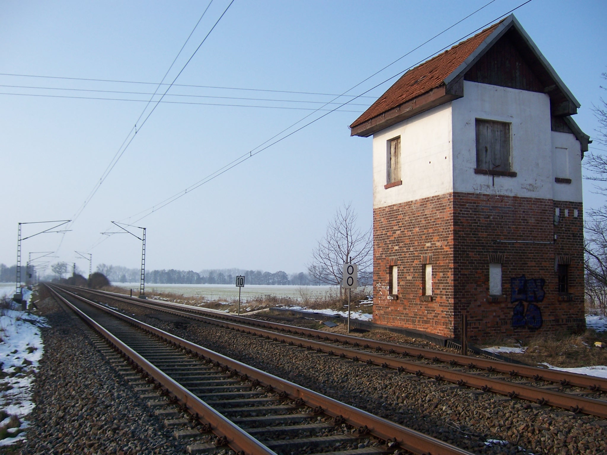 ehemalige Blockstelle Trebnitz, Bahnstrecke Trebnitz–Leipzig, dahinter Bahnstrecke Biederitz–Trebnitz